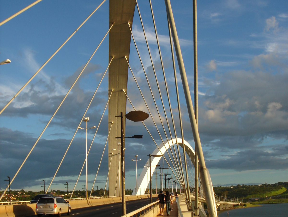 Bridge Juscelino Kubitschek (Ponte JK), Brasilia, D.F., Brazil, 2006